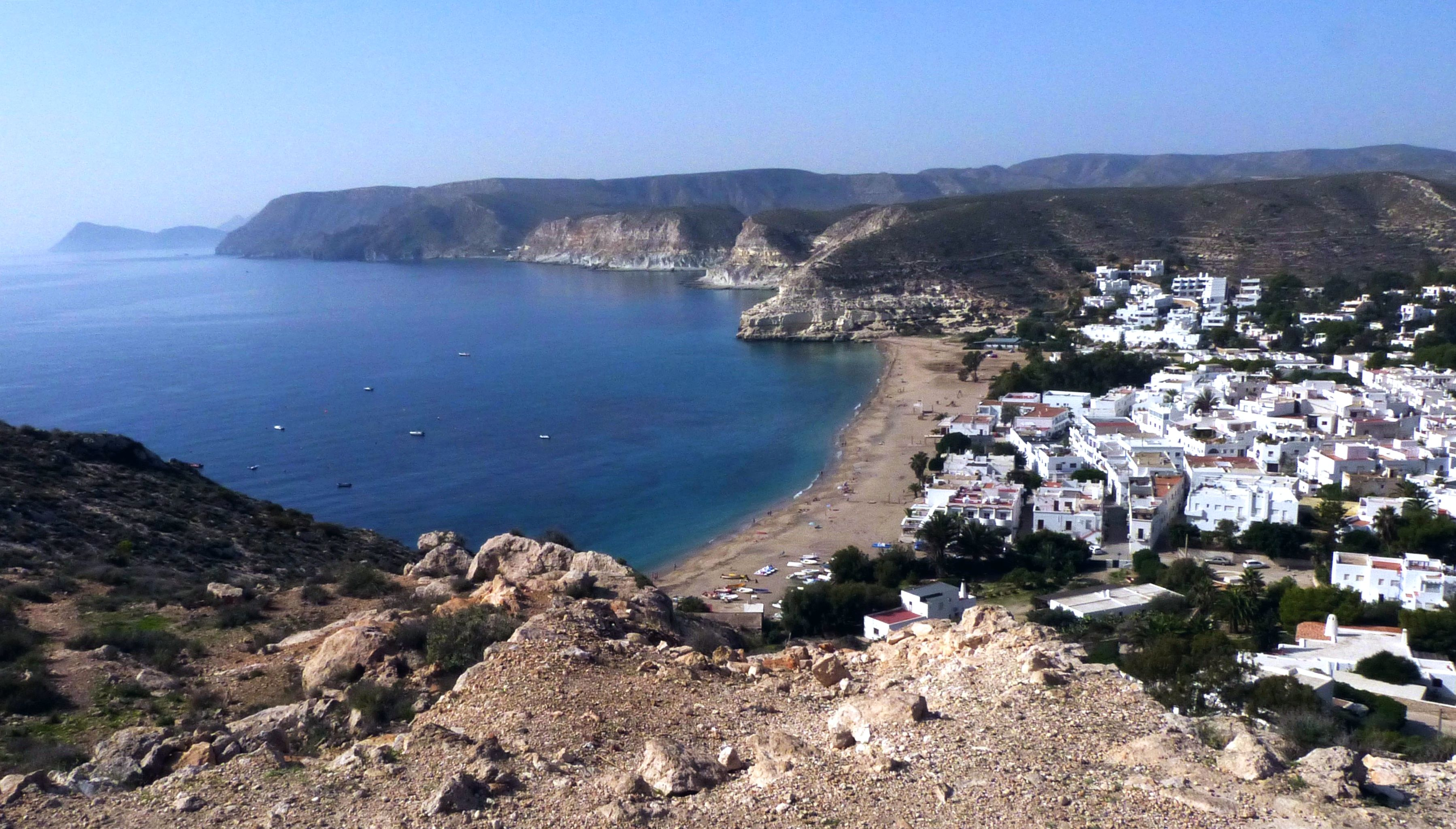 Blick auf Agua Amarga im PN Cabo de Gata-Níjar